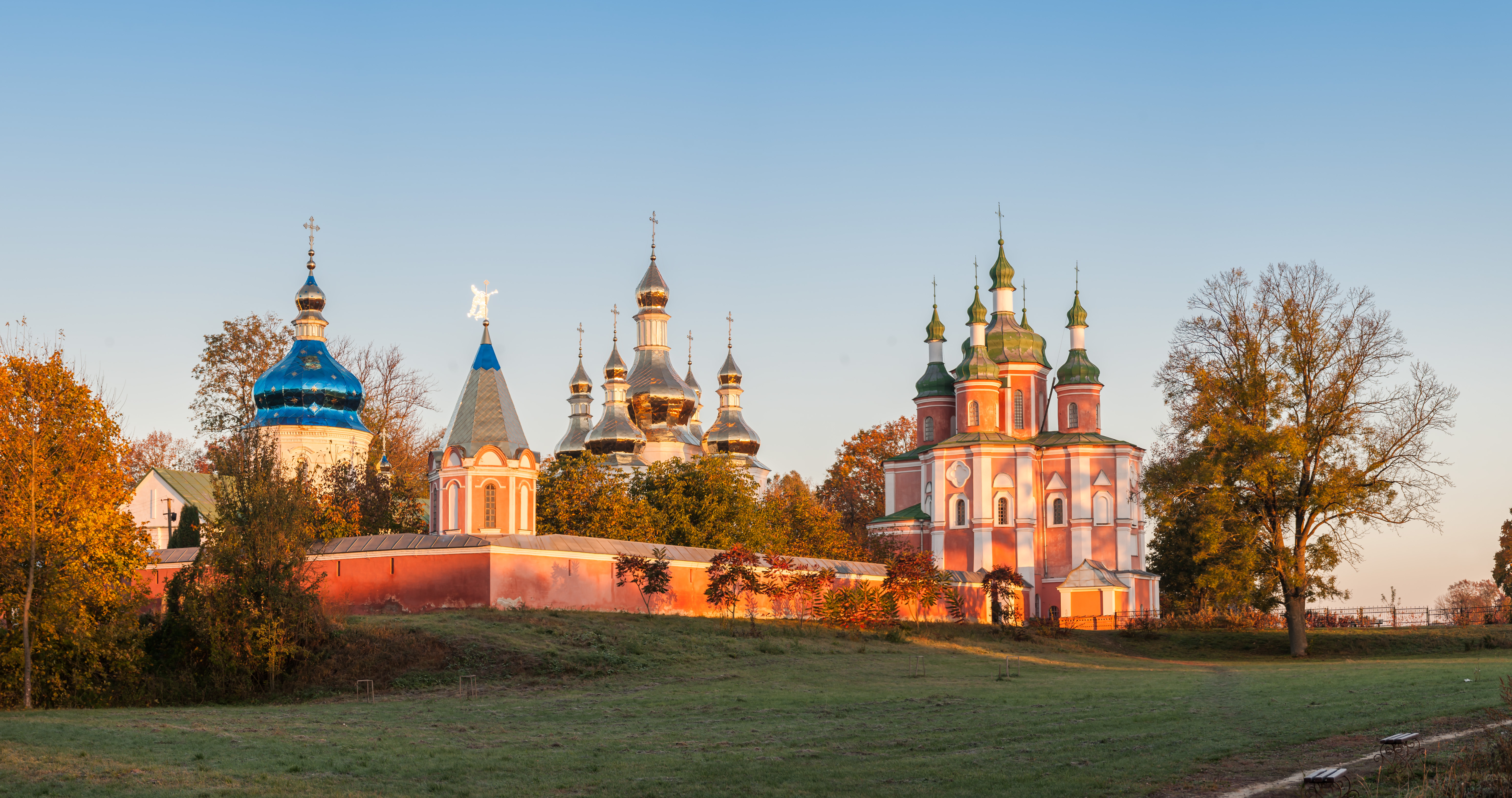 Густинський монастир, с.Густиня